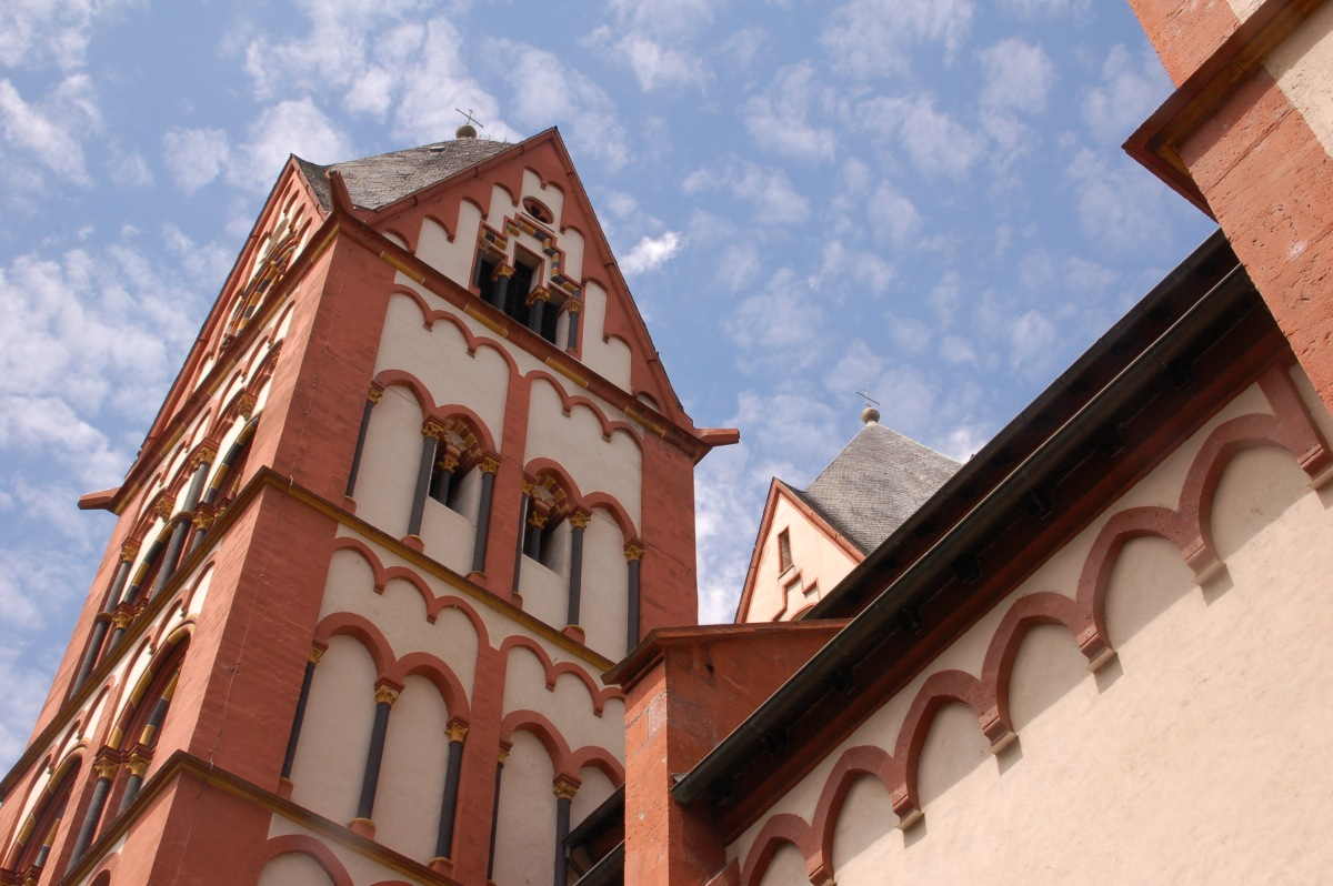 Limburger Dom, Limburg, Hessen, Deutschland